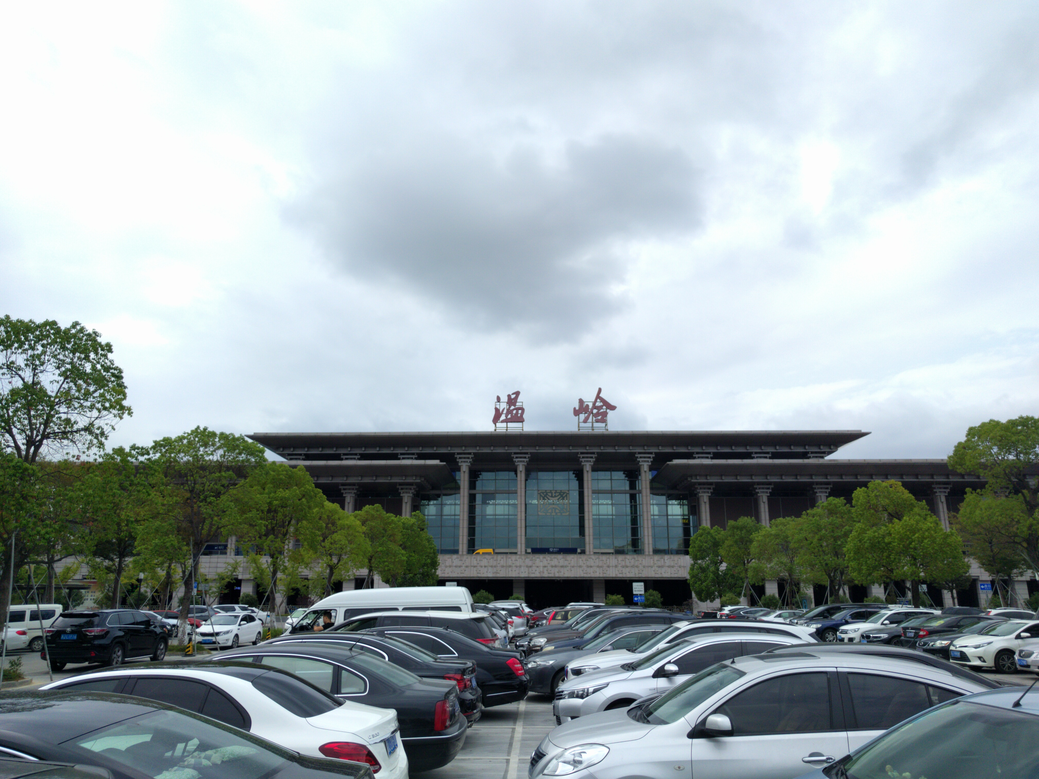 中文（中国大陆）: 温岭火车站